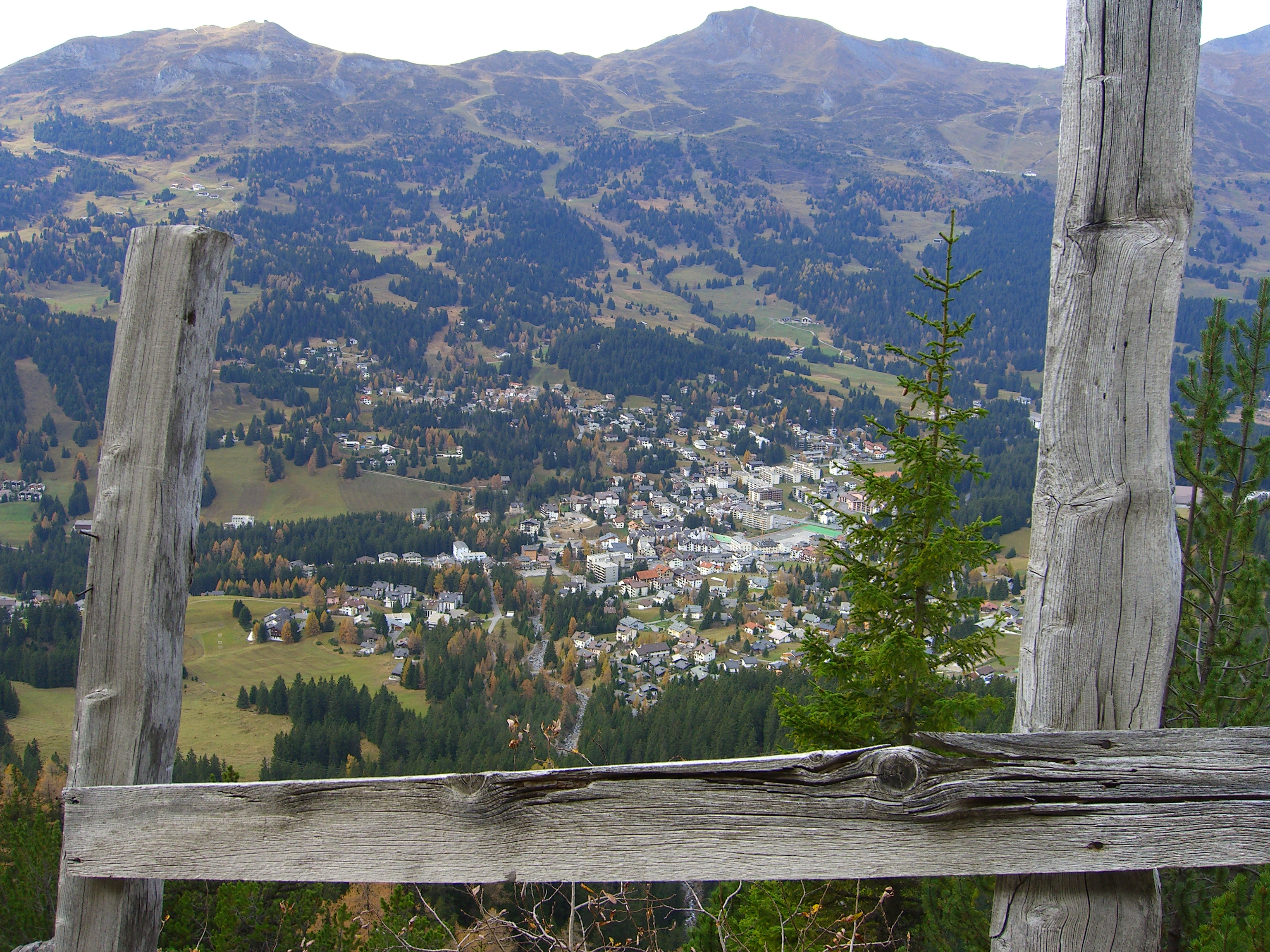 Ferienort Lenzerheide (Graubünden/Schweiz)